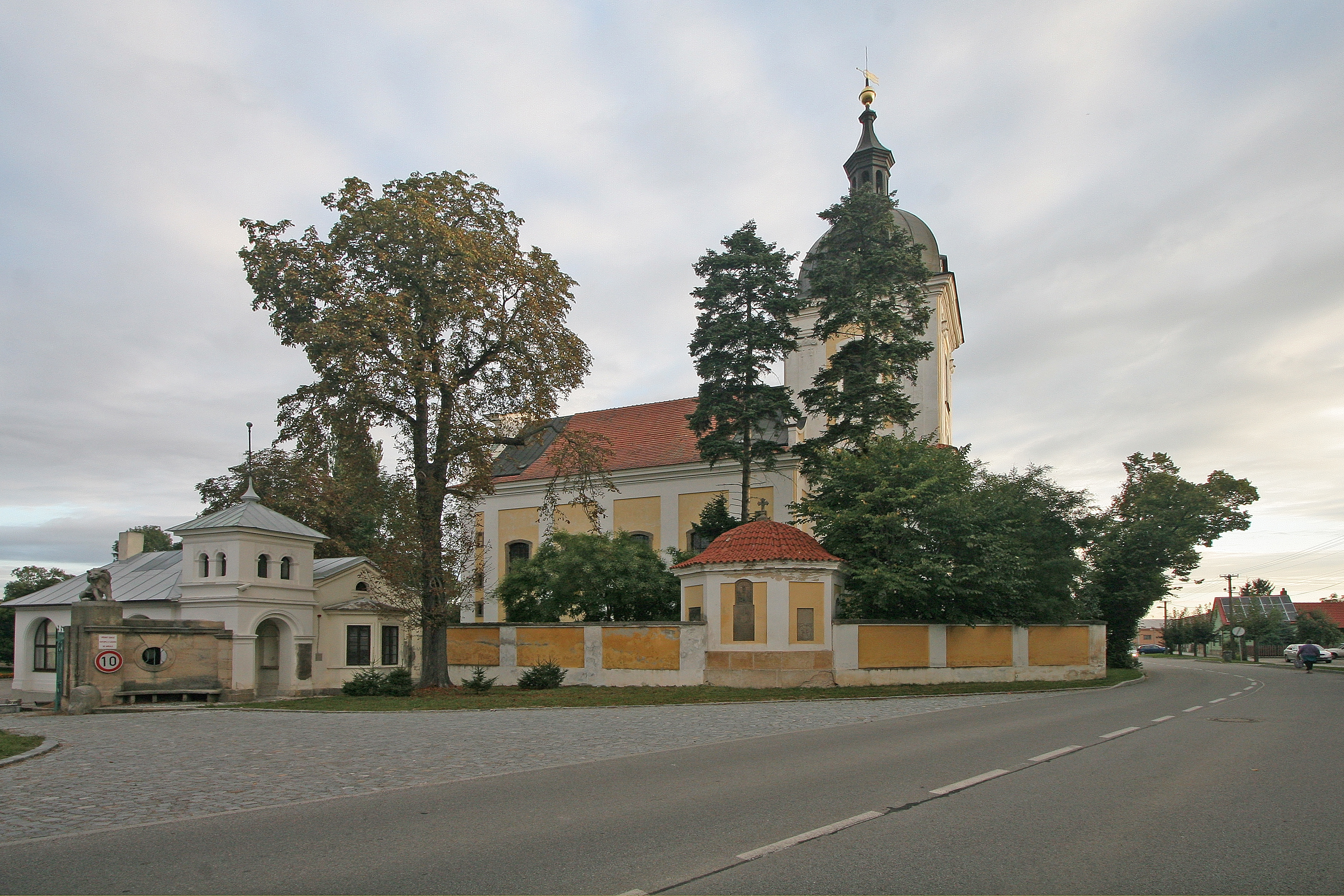 Kostel sv. Klimenta (Dobřenice), Dobřenice